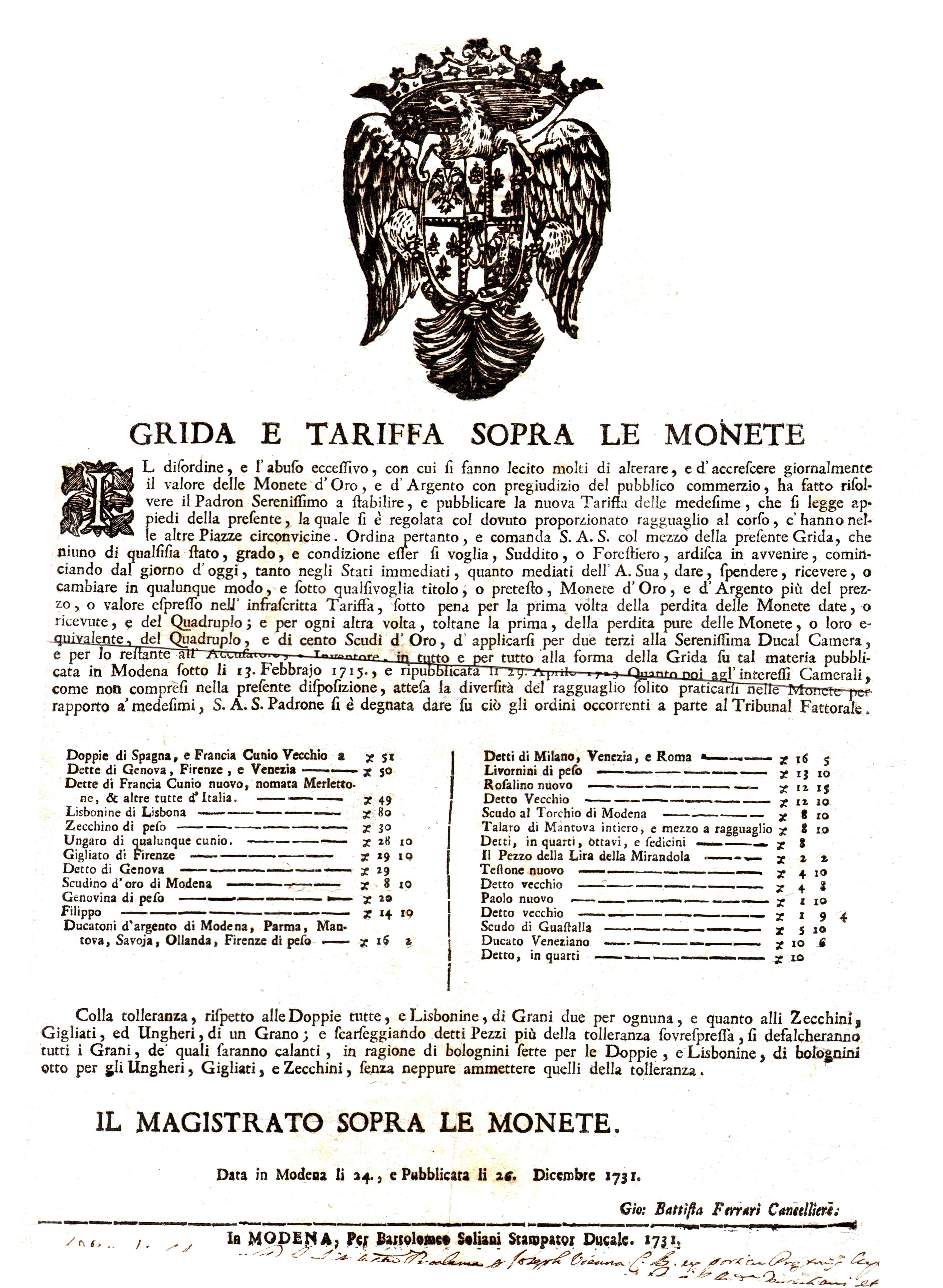 Grida e tariffe sulle monete (Modena 1731)